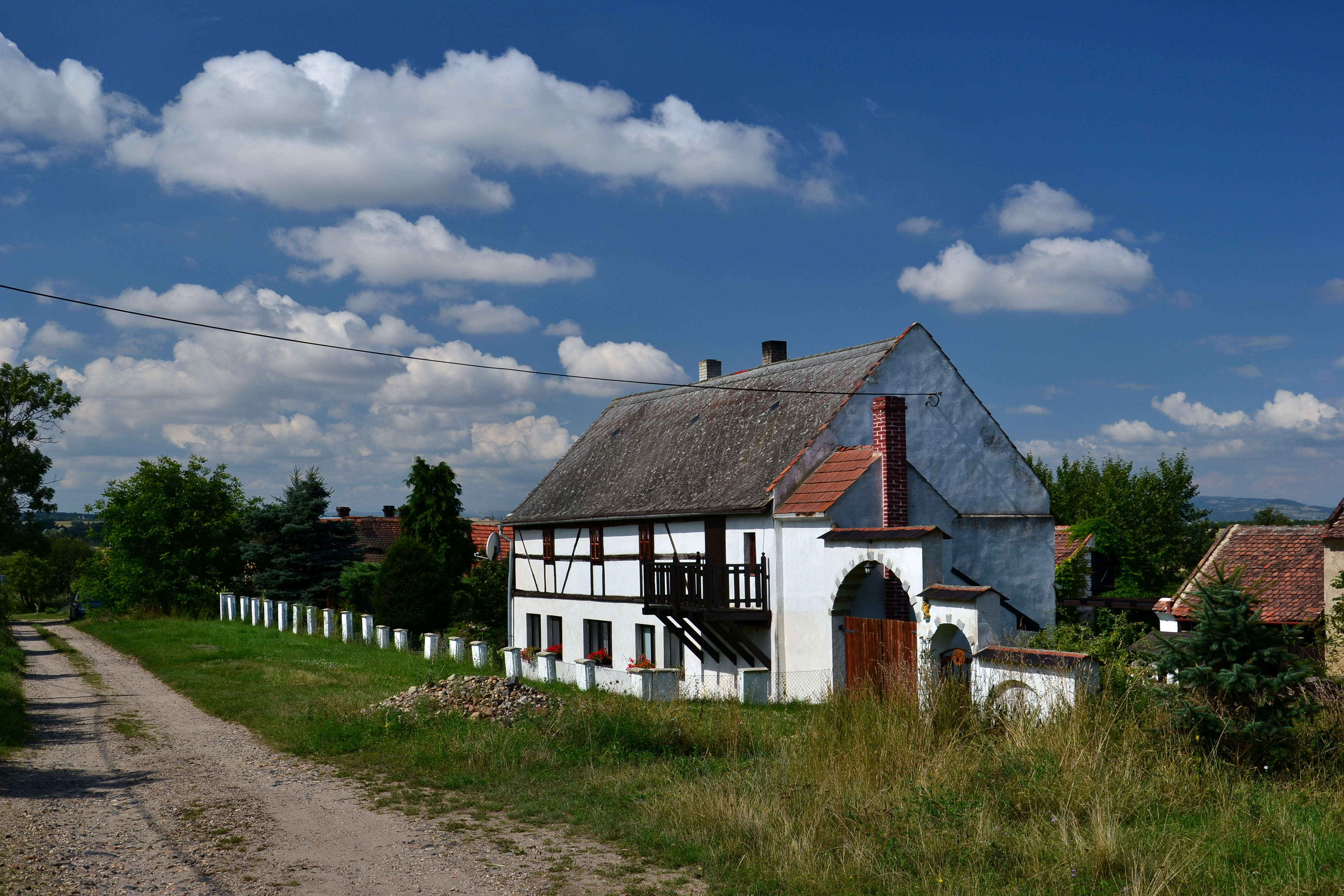 Přívlaky - hrázděný dům č. p. 17